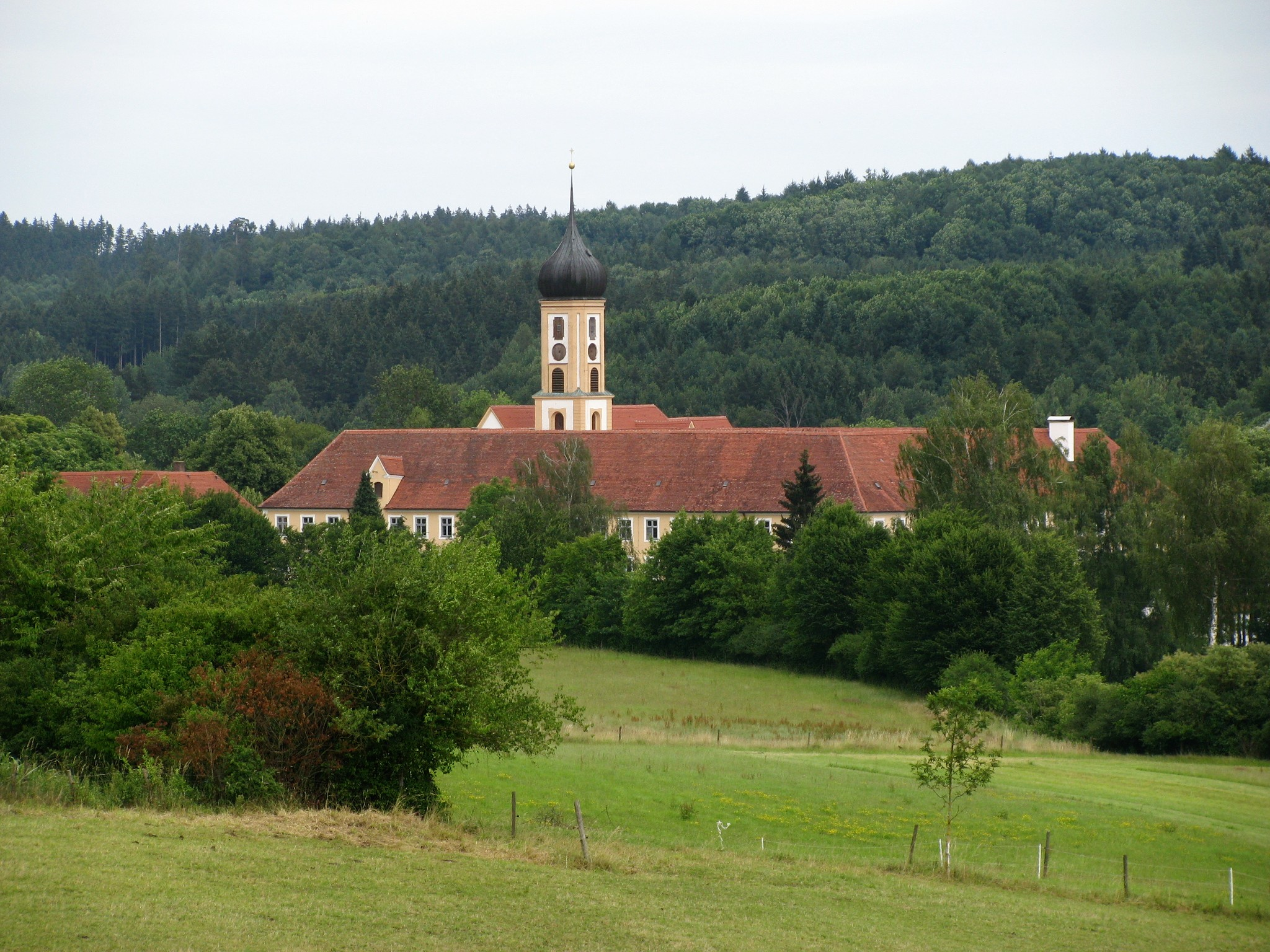 Kloster Oberschönenfeld